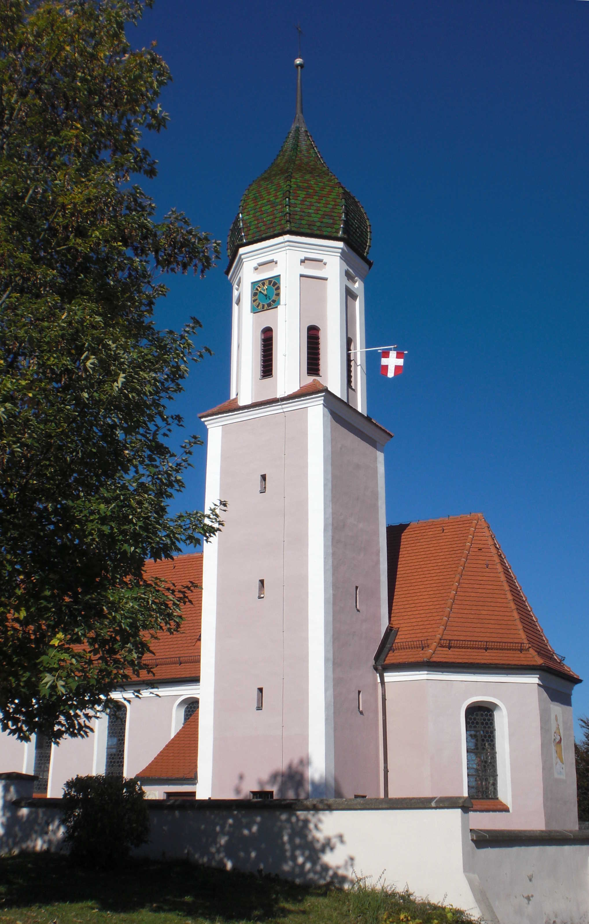 Katholische Pfarrkirche St. Nikolaus in Rechbergreuthen, einem Ortsteil von Winterbach im Landkreis Günzburg (Bayern)